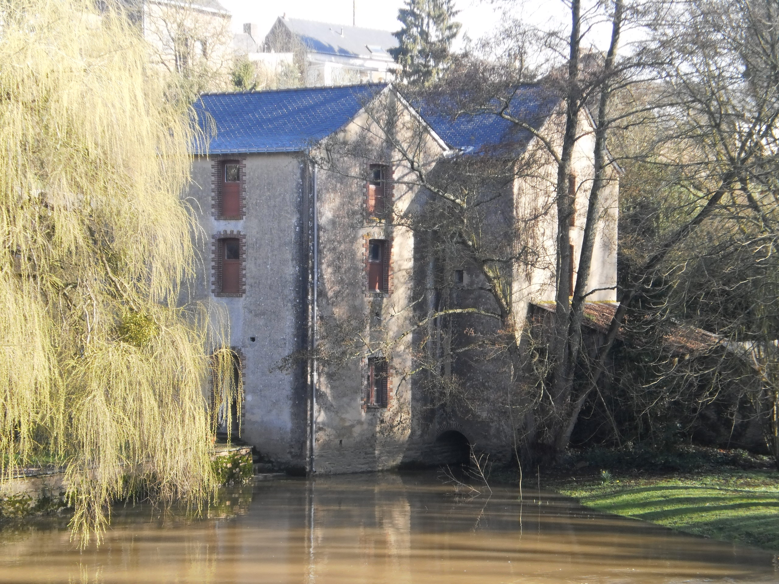 Bonnoeuvre (Loire-Atlantique, France) - moulin à eau